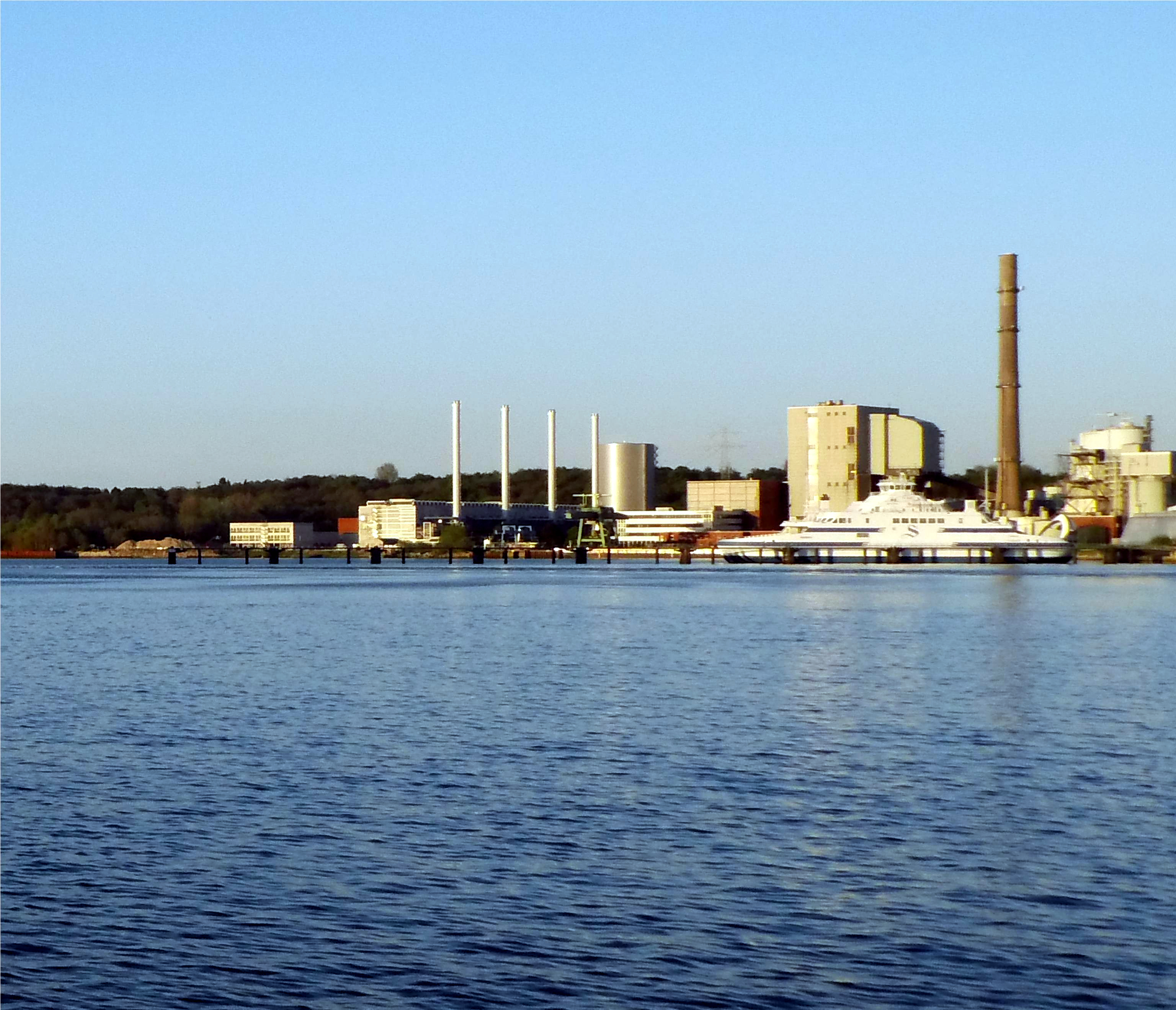 coal-fired power station Kiel (right) and new gas engine power station (left).